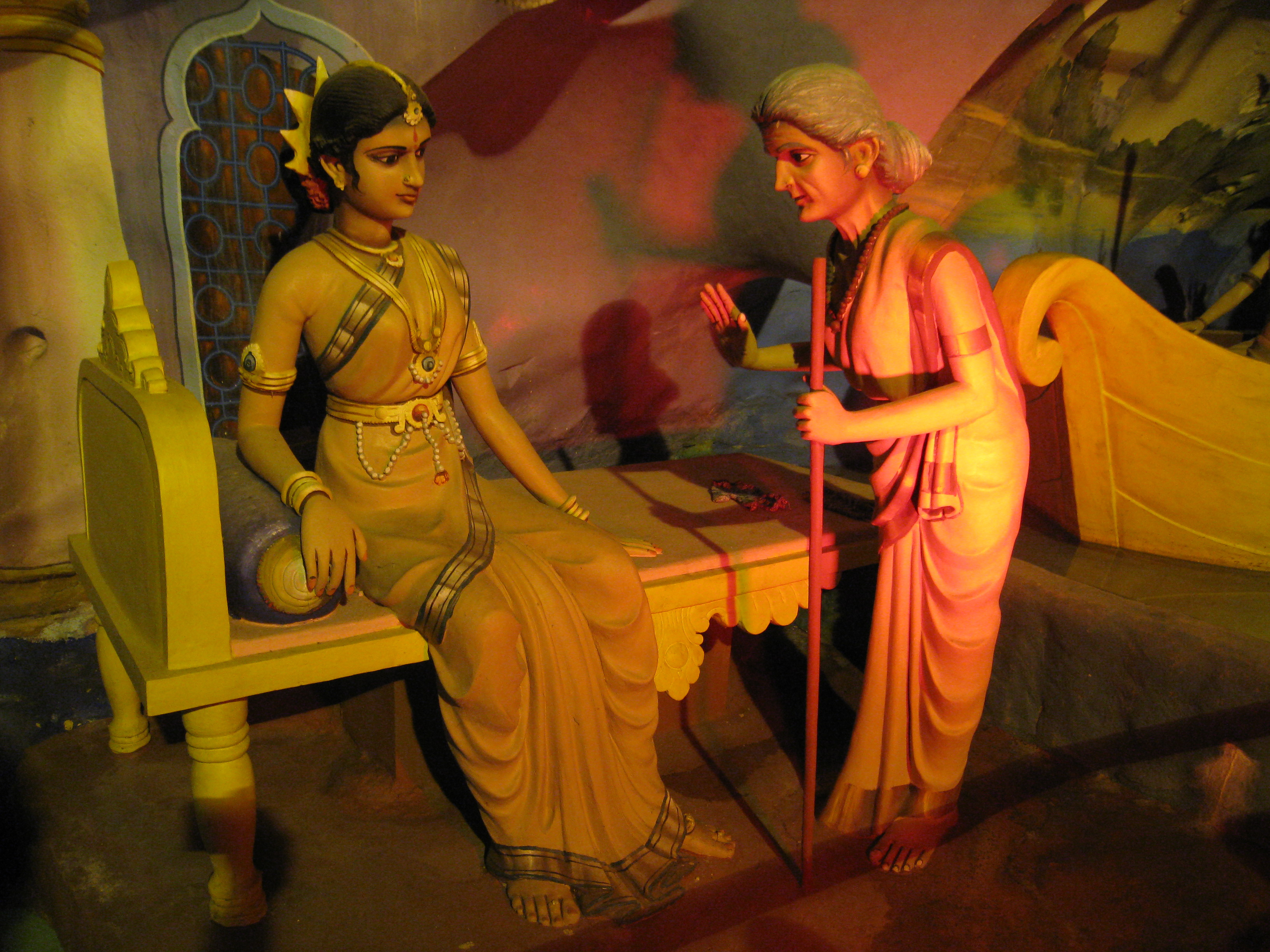 56 Kaikeyi being led astray by Manthara, at Batu Caves, Kuala Lumpur